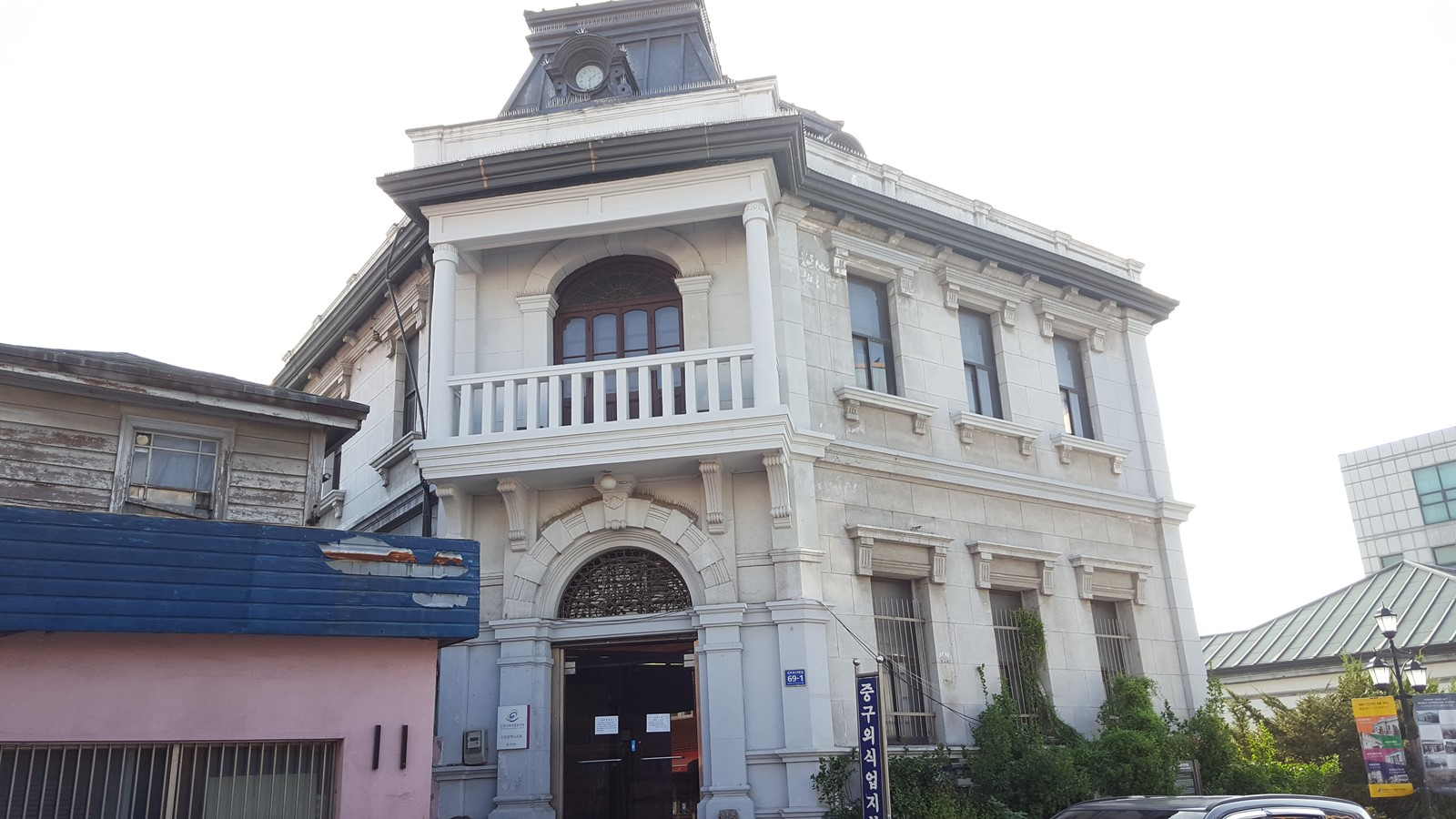 201609 구인천일본58은행인천지점